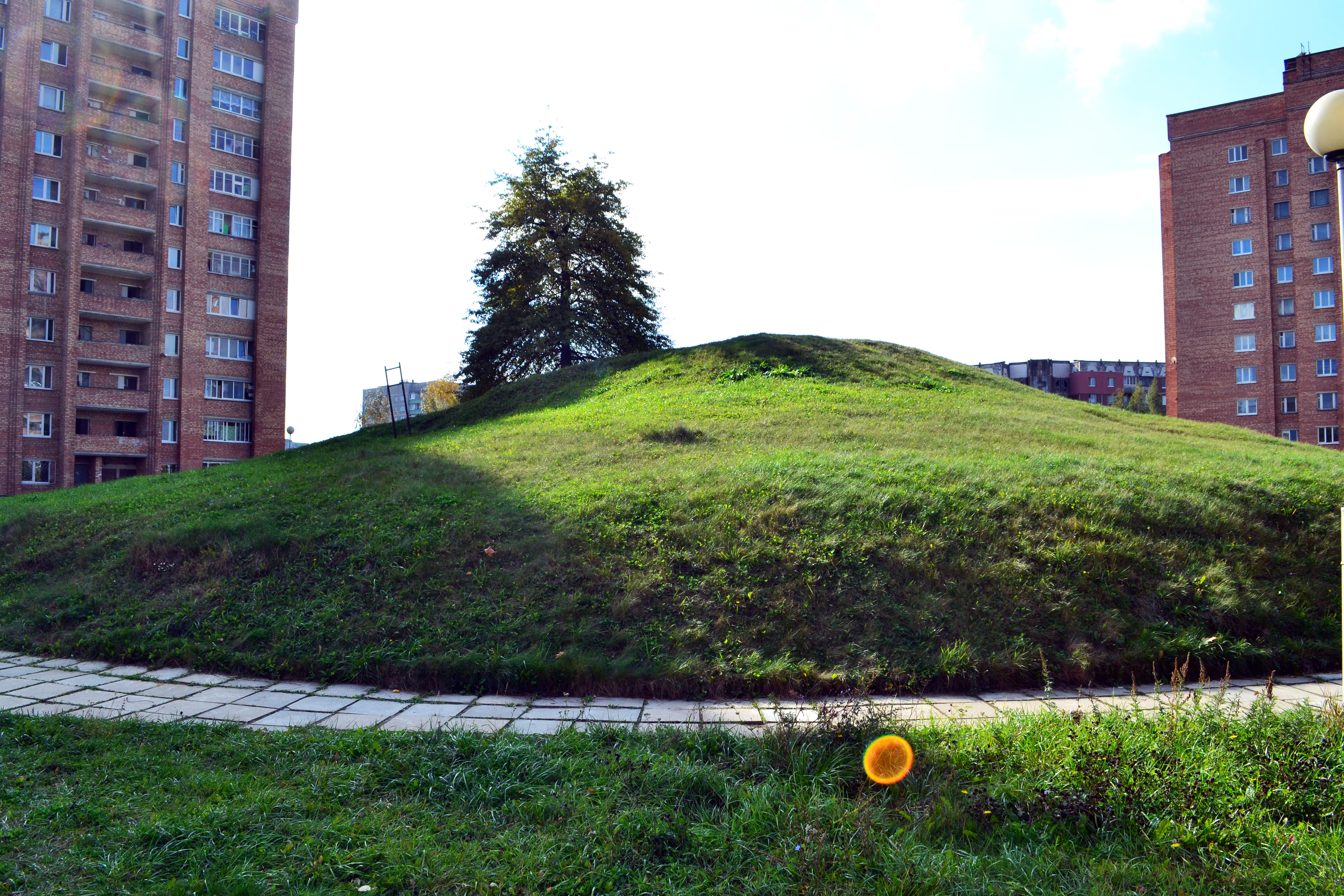 Беларуская (тарашкевіца): Курганны могільнік у менскім мікрараёне Паўднёвы Захад, між дамамі №22/2 і №20 на пр. газэты «Звязда» This is a photo of Belarusian heritage monument. Reference number: 713В000037 ( WLM)